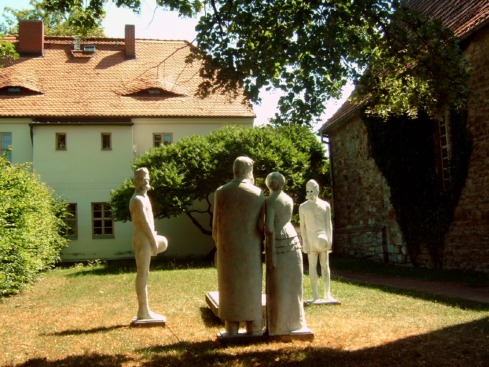 Geburtshaus des Philosophen Friedrich Nietzsche mit Denkmal in Röcken